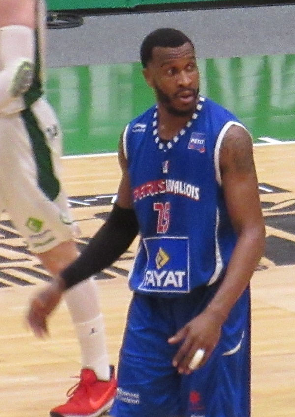 Jason Rich